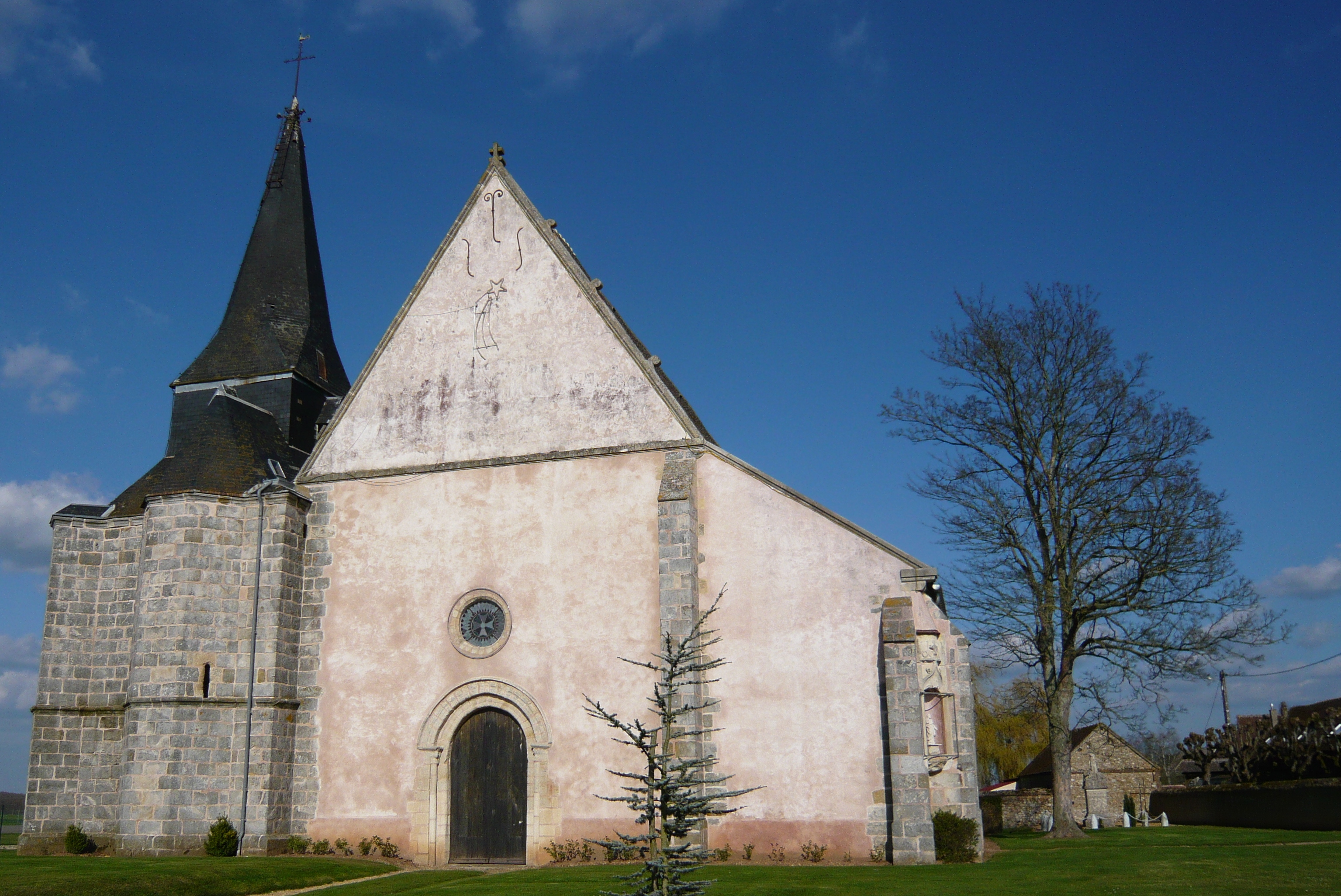 Église Saint-Pierre de Marville-Moutiers-Brûlé et monument aux morts, Eure-et-Loir (France).